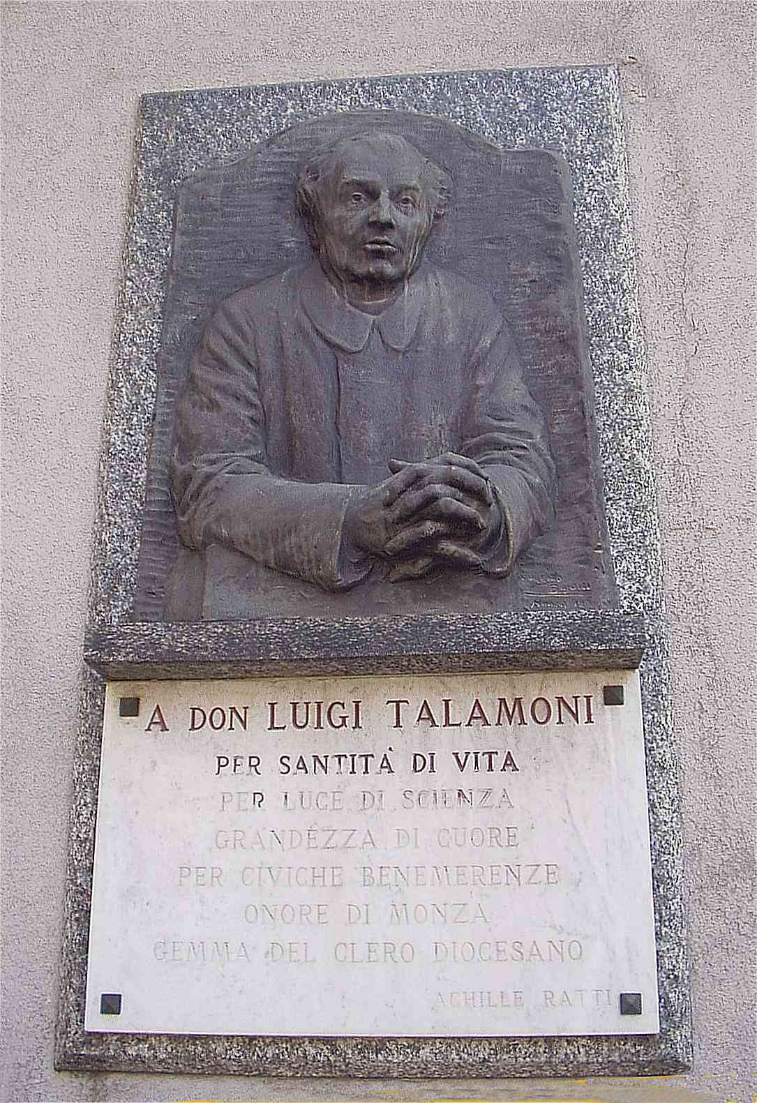 Monza lapide commemorativa dedicata a Don Luigi Talamoni in piazzetta Santa Margherita